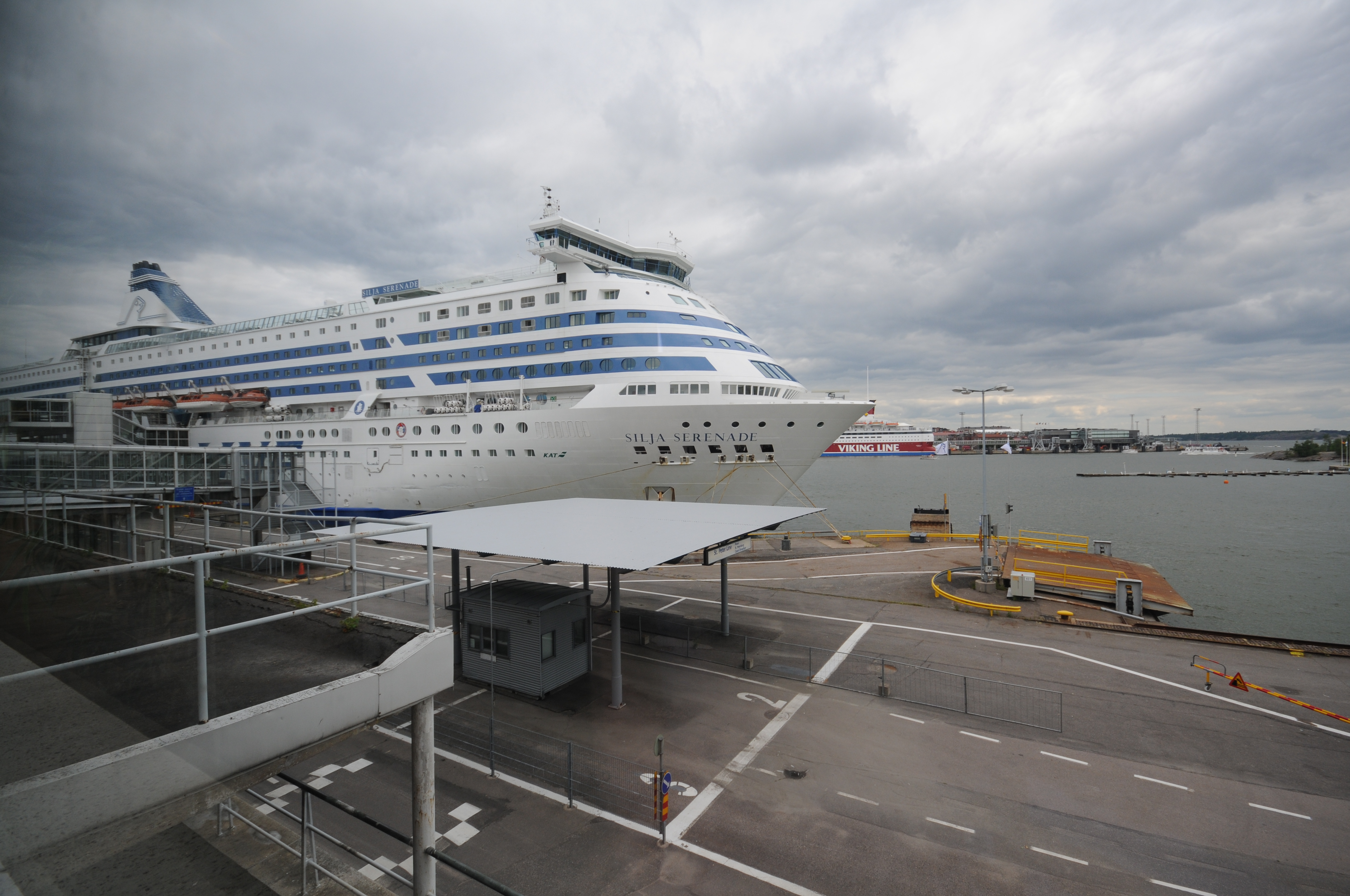 Helsinki